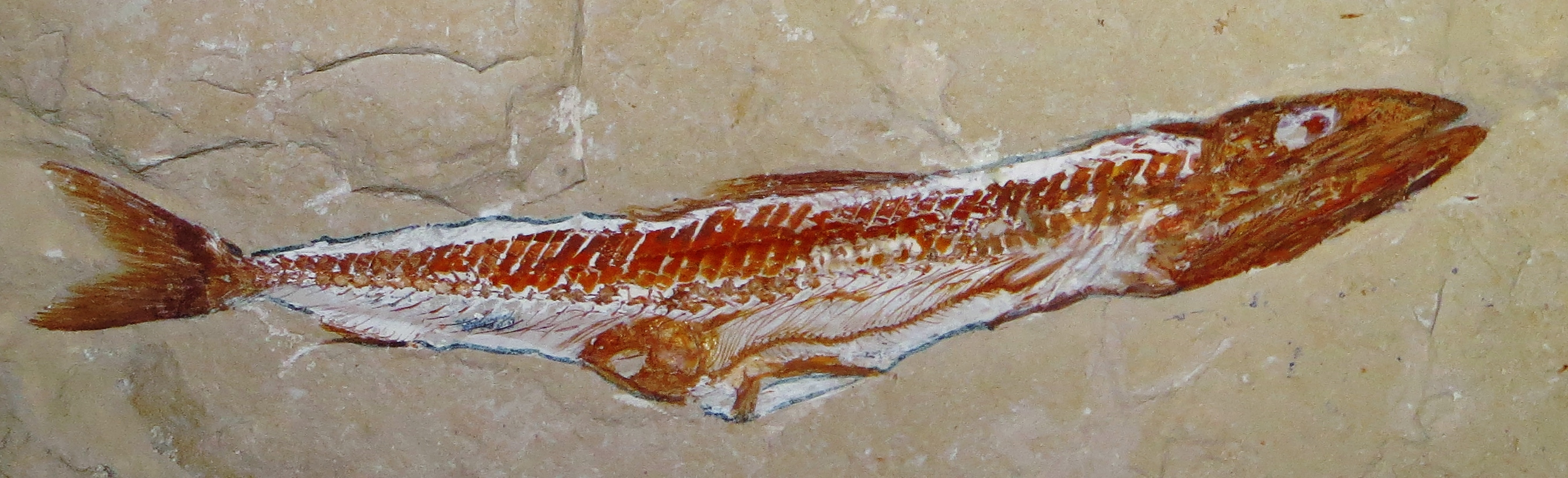 Fossil of Prionolepis - Took the picture at Museo di Storia Naturale, Milano